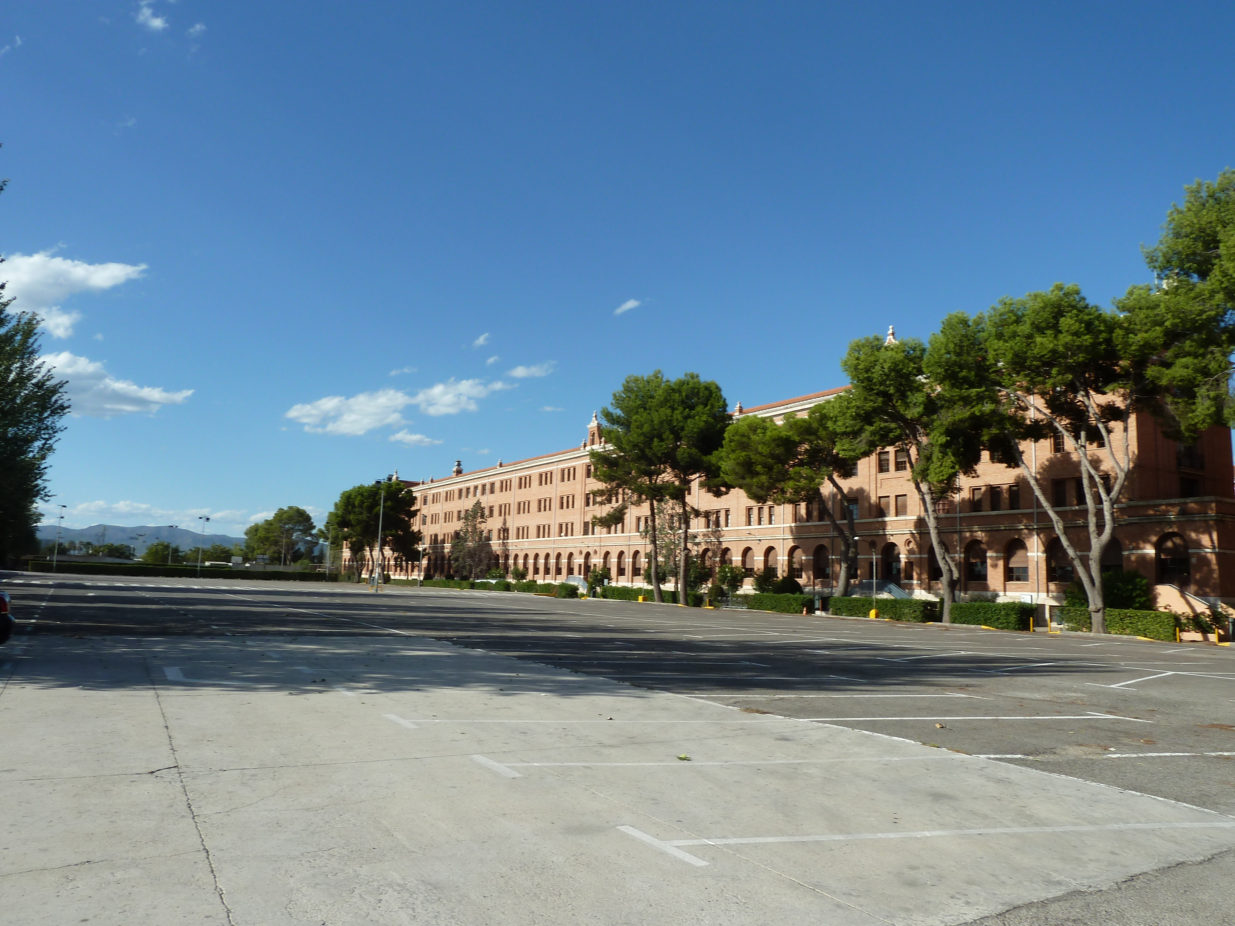 Seminari Metropolità de Valencia. Pavelló Nou. Montcada (Espanya)